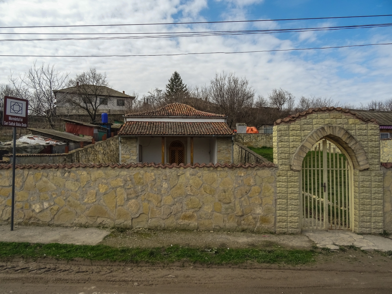 Mormântul lui Baba - Sari - Saltuc - Dede